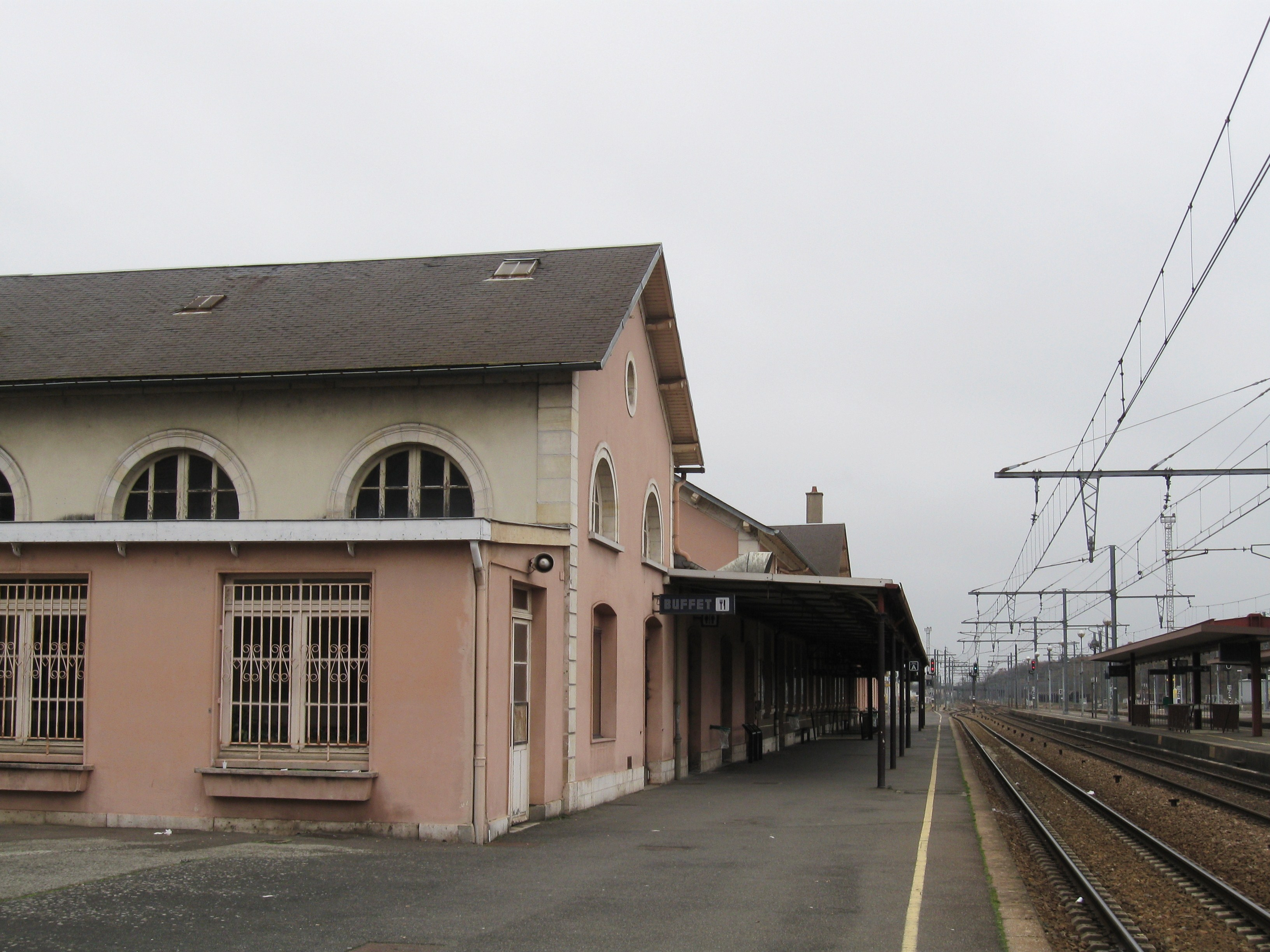 Gare de Montargis, Loiret, France